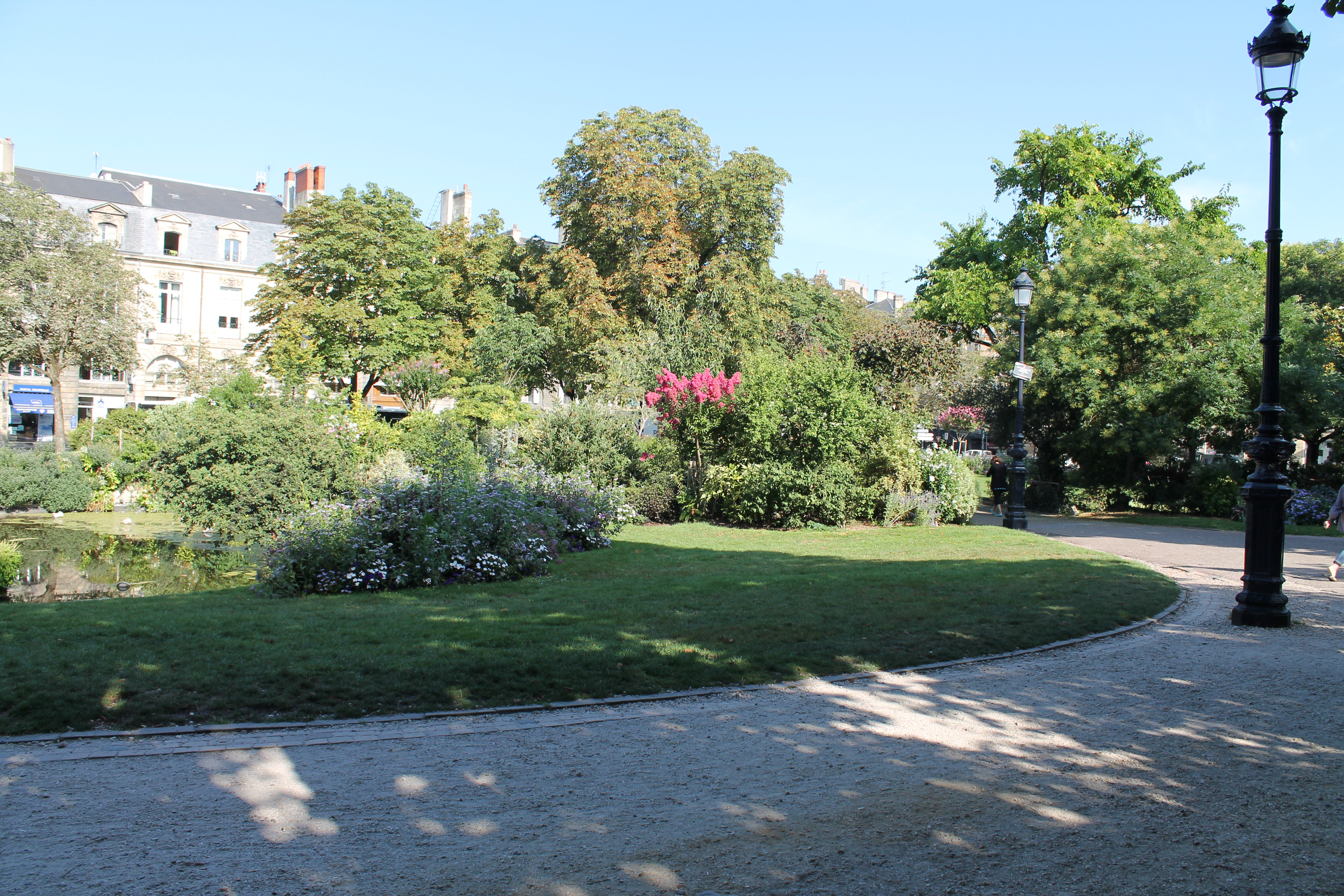 Place Gambetta